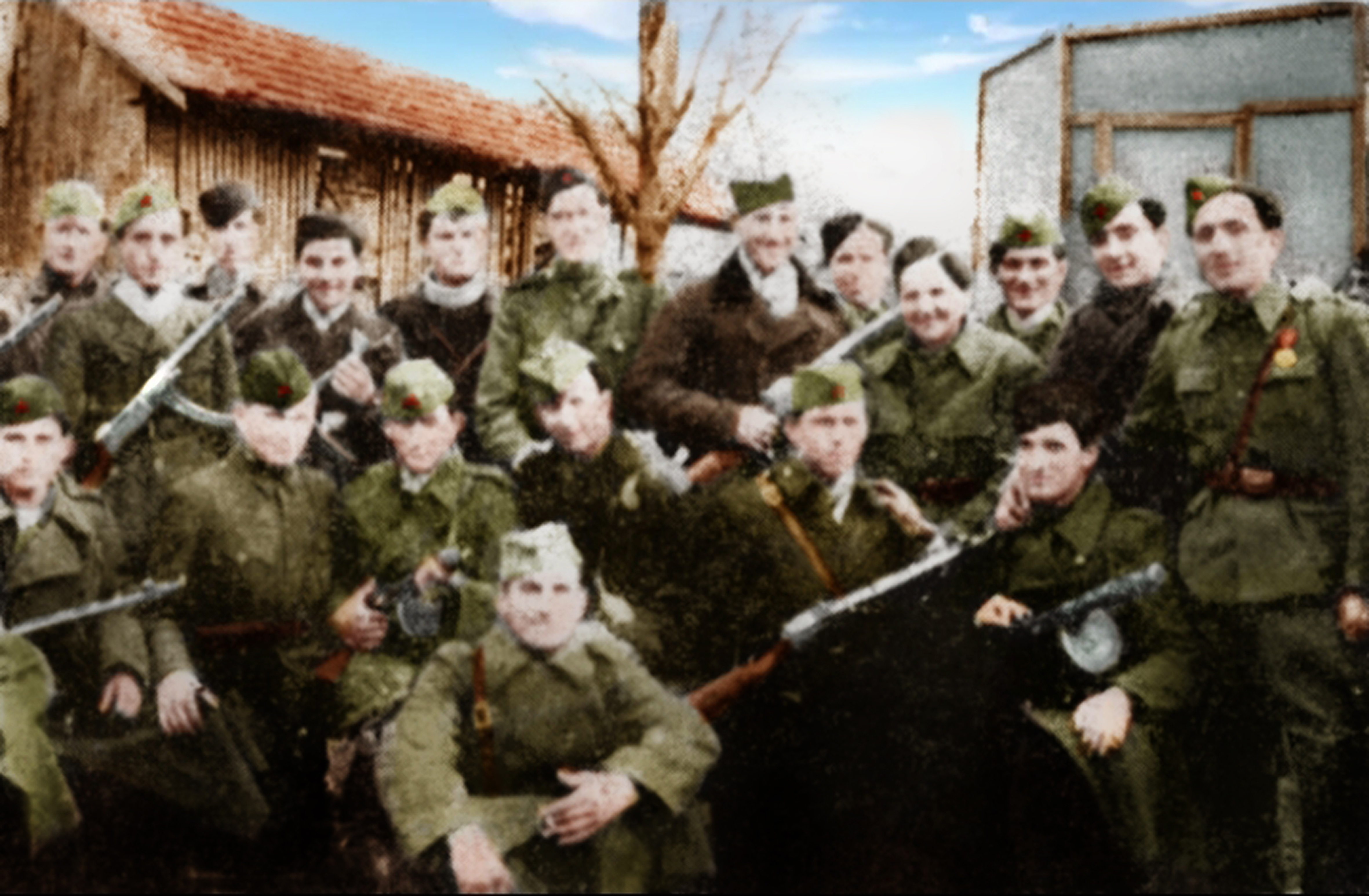 Извиђачи дванаесте војвођанске ударне бригаде